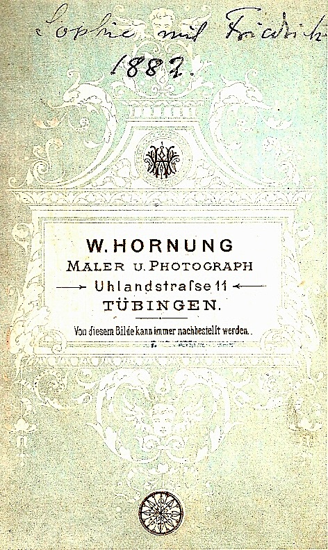 Rückseite von File:WHornung-Sophie Buelow.jpg, eines Kabinettformats von Sophie Friederike Bülow